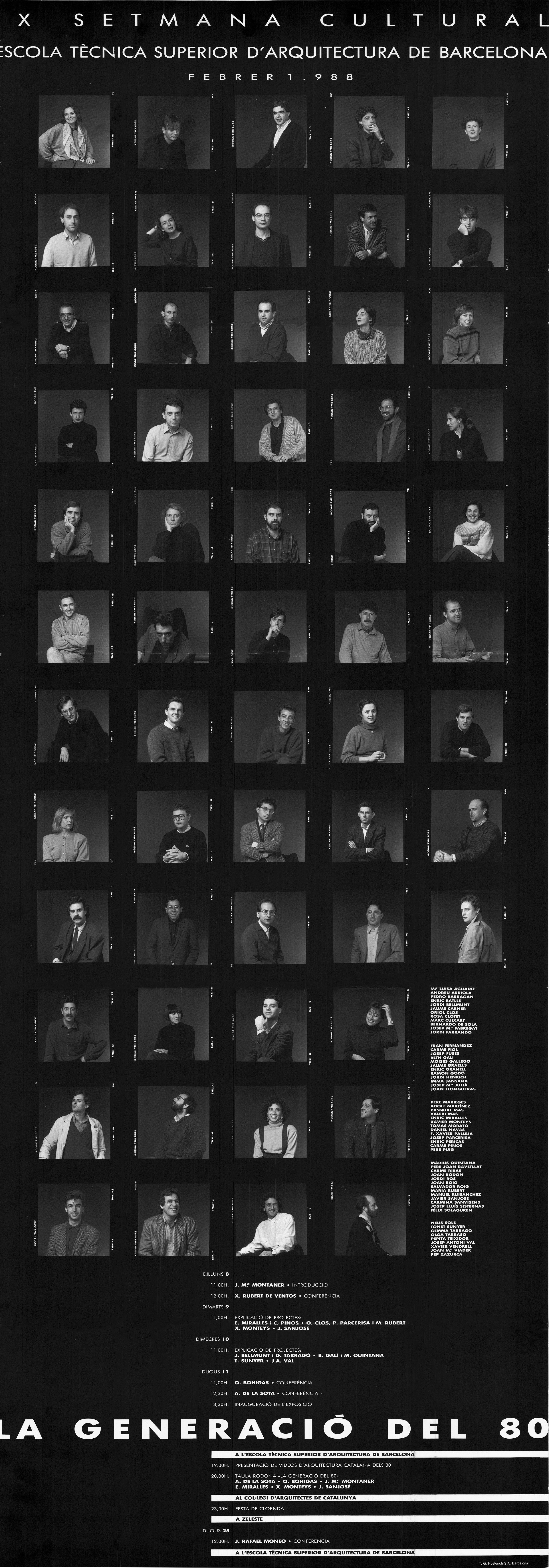 ​“La generación del 80” se organiza la exposición y las jornadas que co-producidas por el Colegio de Arquitectos de Catalunya y la Escuela Superior de Arquitectura de Barcelona sirven para visulizar la obra de este grupo